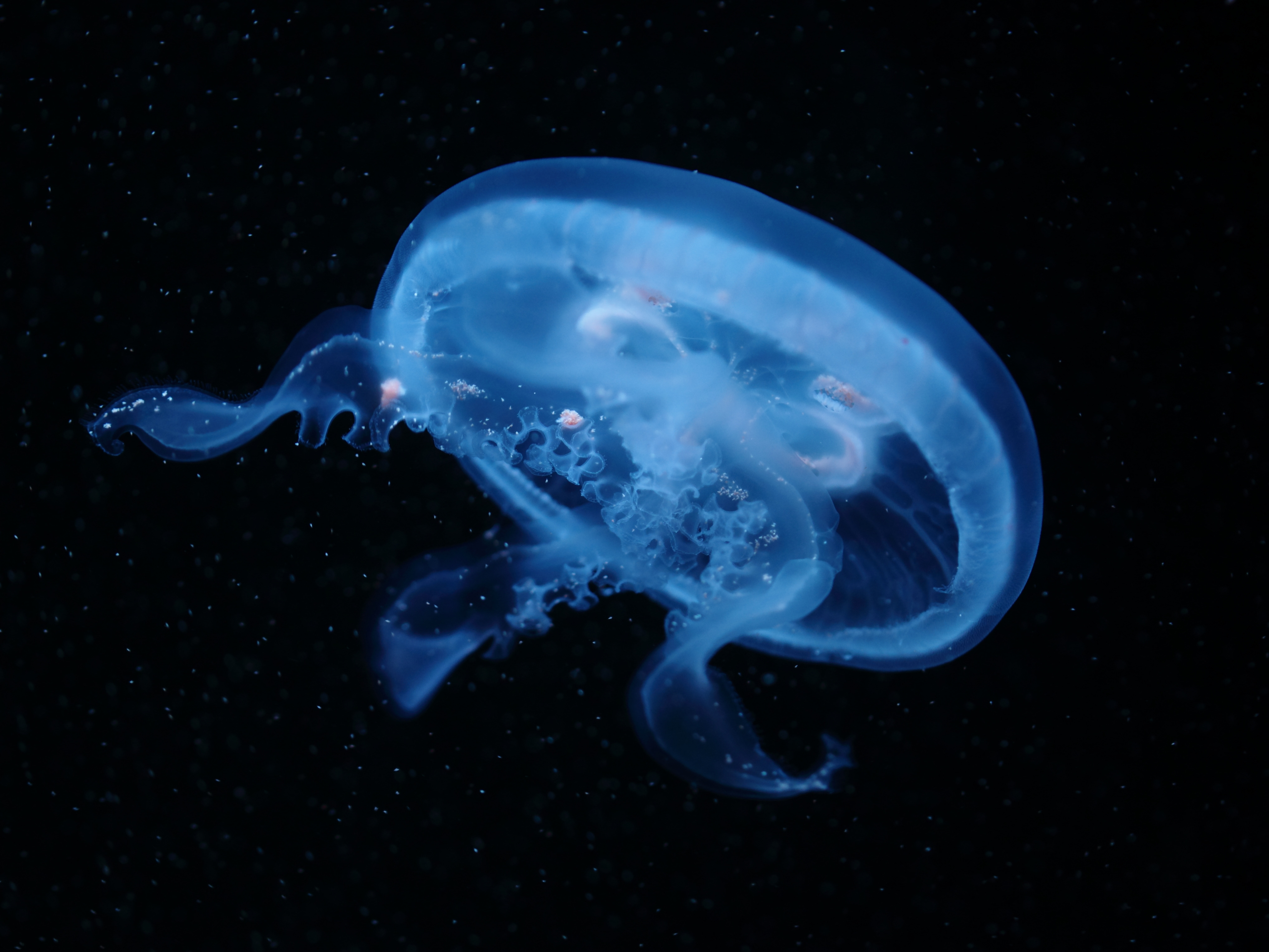 Aurelia labiata im Tiergarten Schönbrunn.